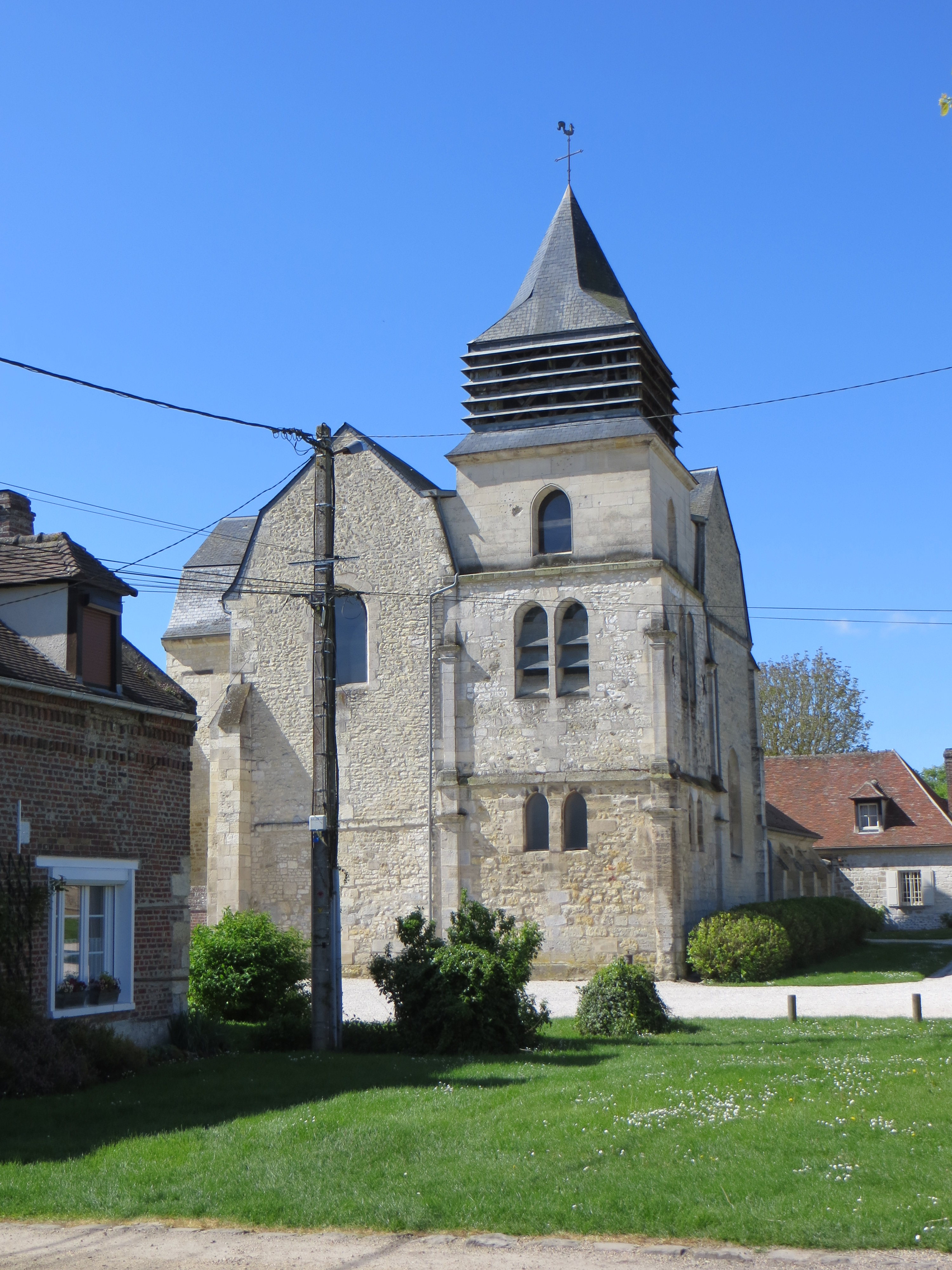 Vue générale de l'église